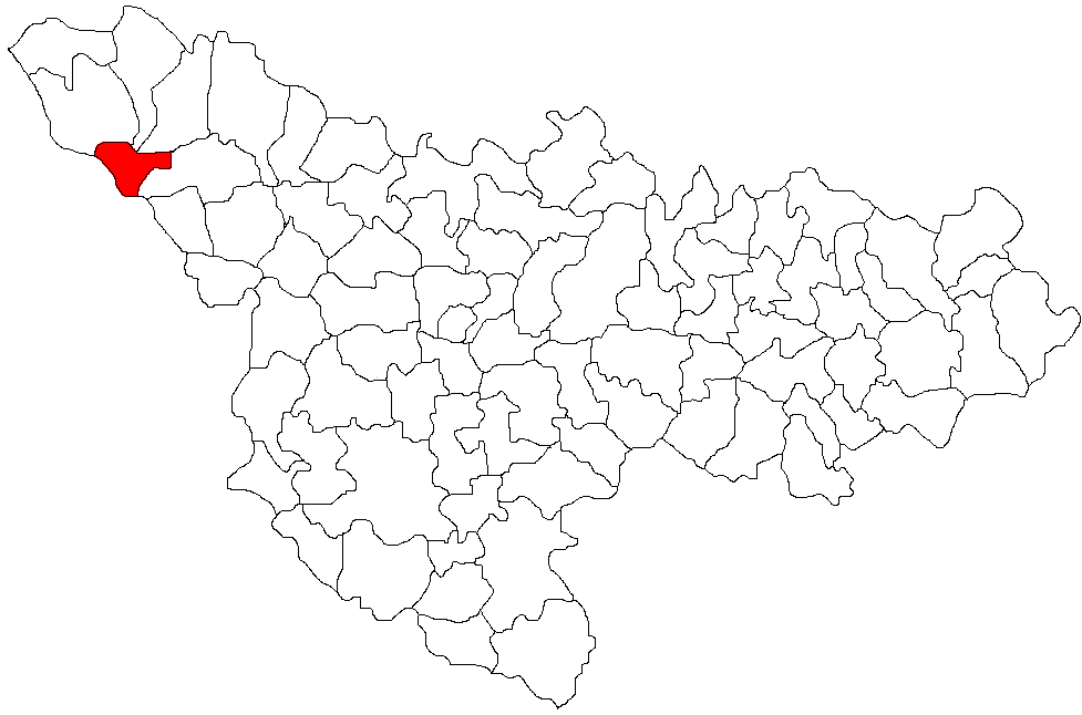 Teremia Mare, judetul Timis Licensing Categorie:Hărţi ale judeţului Timiş